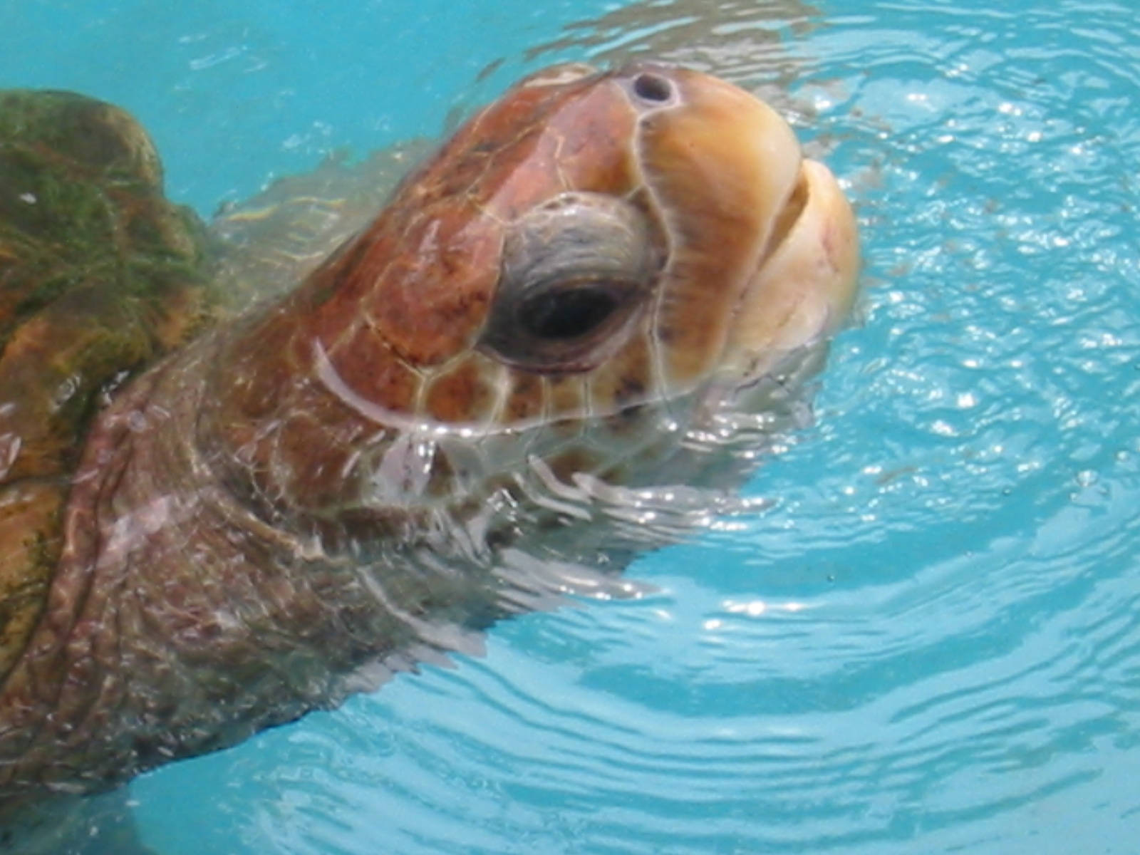 Tataruga, Praia do Forte, Bahia, Brazil